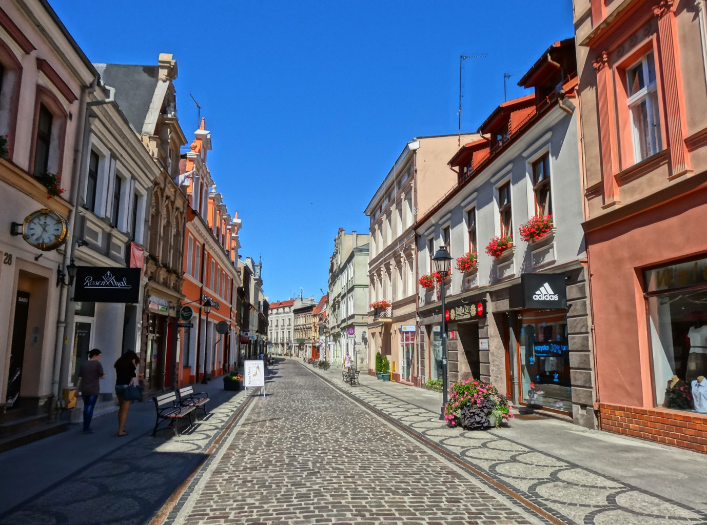 Ulica Długa na Starym Mieście w Bydgoszczy